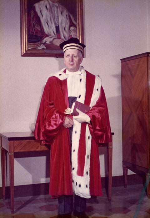 Foto di Famiglia del Giudice Mario Berri